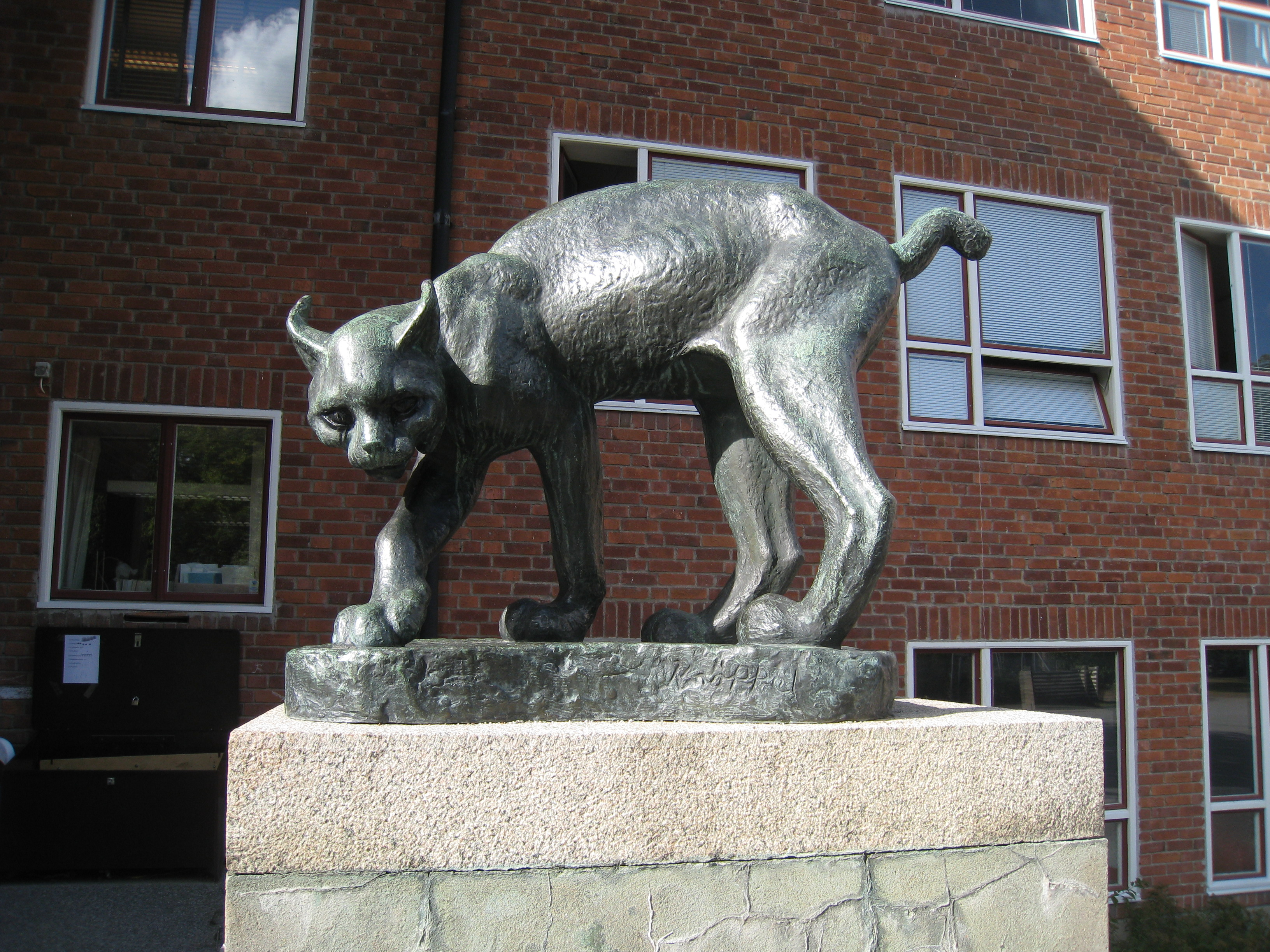 Lodjur, skulptur i brons, av skulptören Arvid Knöppel (1892-1970). Skulpturen står vid trappan på skolgården vid Ulvsundaskolan, Johannesfredsvägen 45 i Bromma.